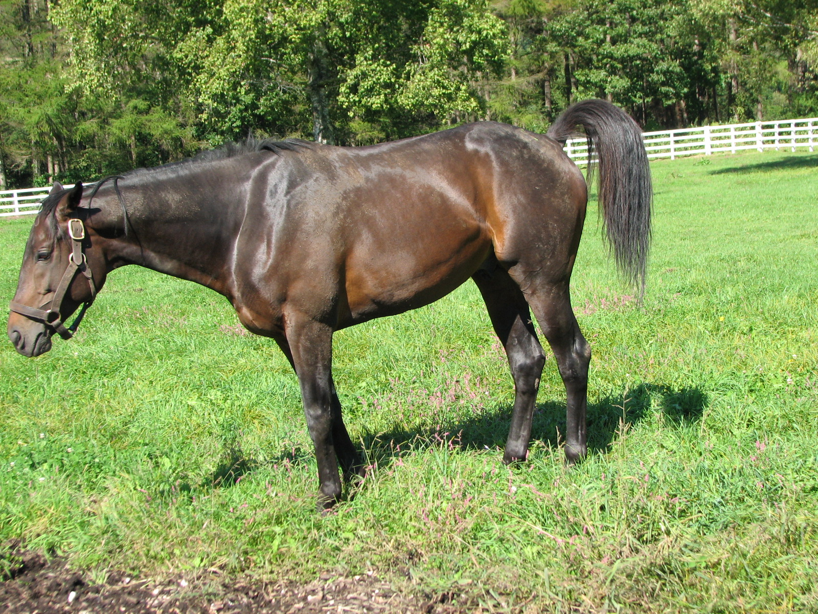 サクラプレジデント（レックススタッド見学時）